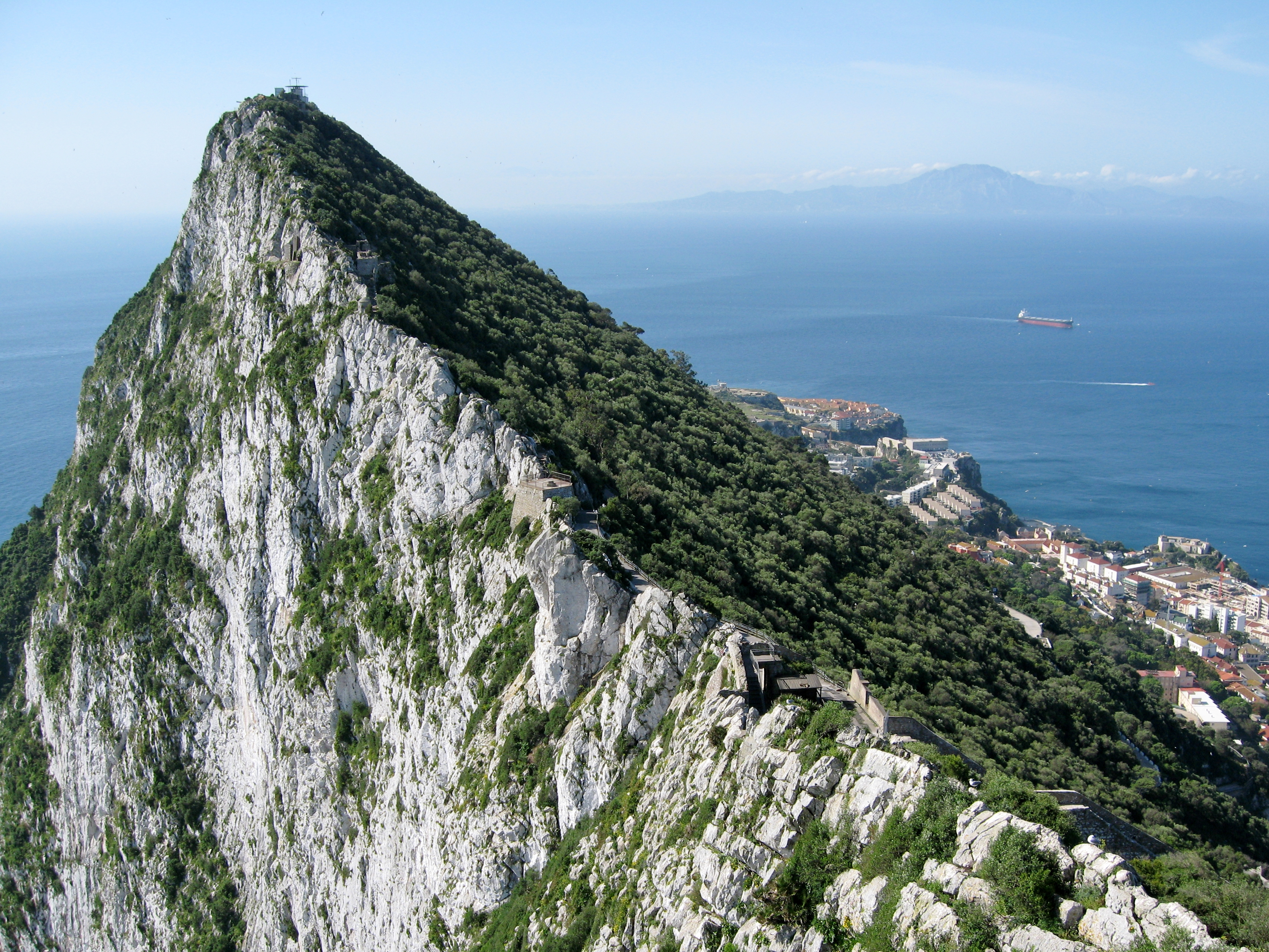 Felsen von Gibraltar (Upper Rock) vor der Straße von Gibraltar